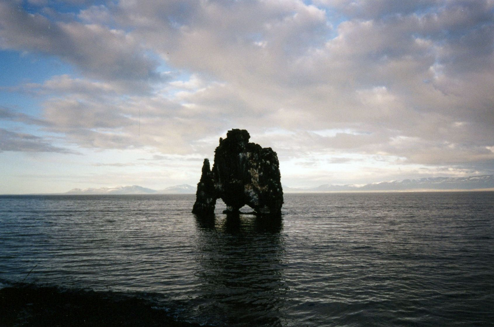 Hvitserkur in Island / 17 juli 2008: foto rechtgezet